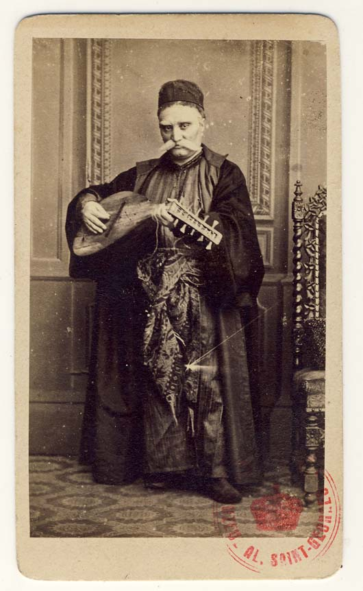 Matei Millo în costum de teatru, piesa Barbu Lăutarul